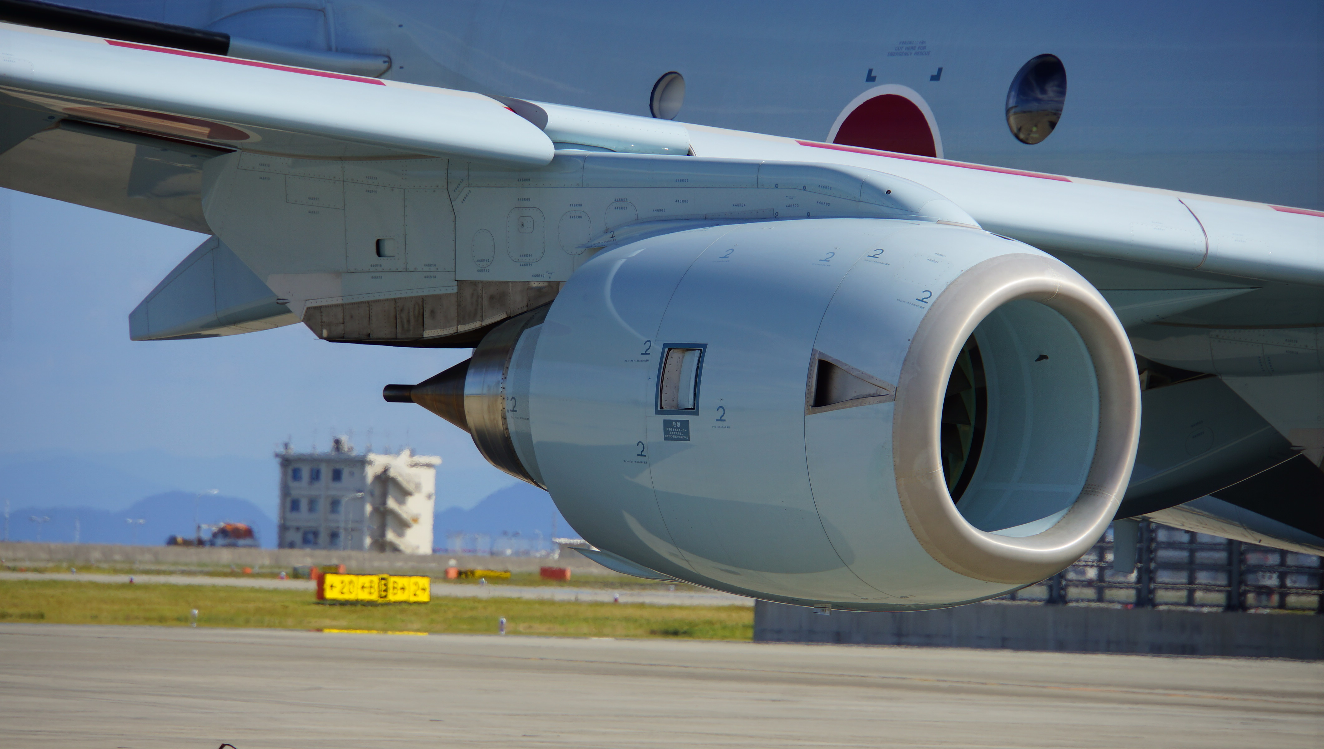 海上自衛隊 P-1哨戒機（5506号機） 右主翼部F7-10ターボファンエンジン。 14年9月14日 岩国航空基地にて。